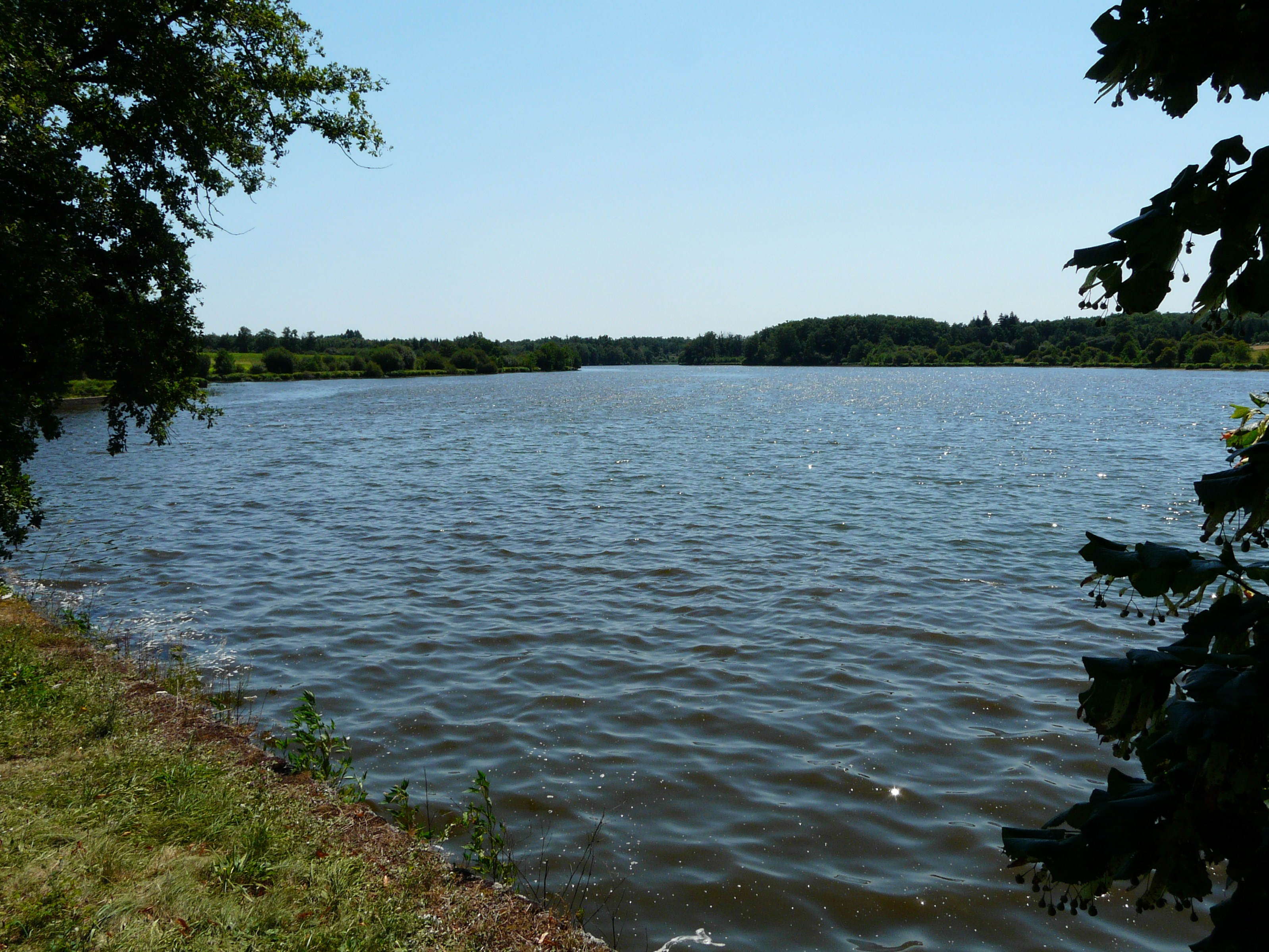 L'étang Grolhier, Busserolles, Dordogne, France.